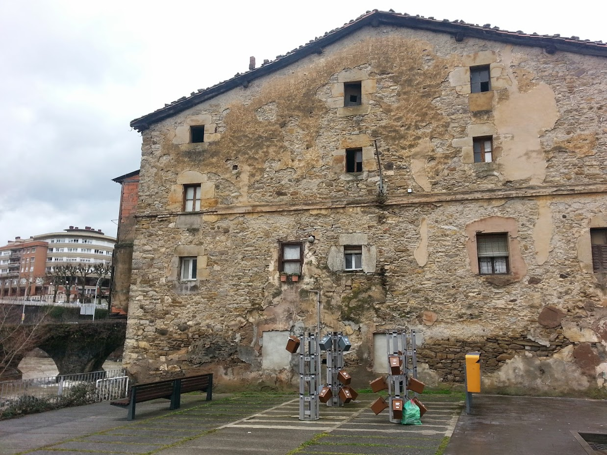 Zabor batze selektiboa. Bergara. Gipuzkoa.